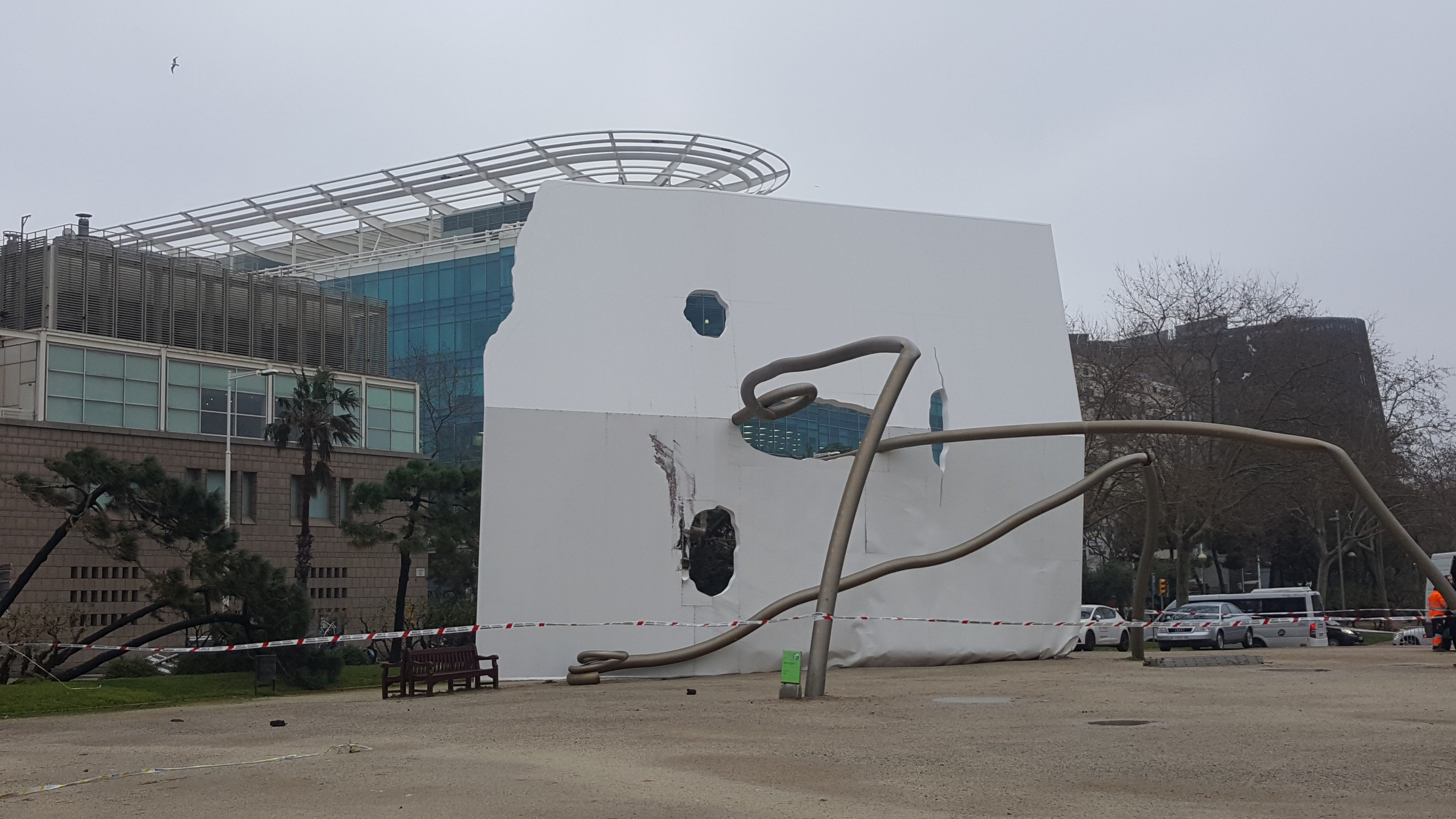 Monument David i Goliat de Vila Olímpica, Barcelona caigut pels efectes del fort vent de la borrasca Gloria